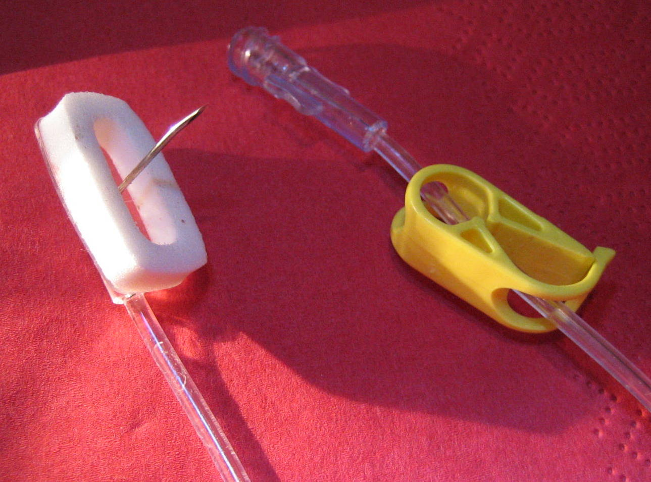 Portnadel